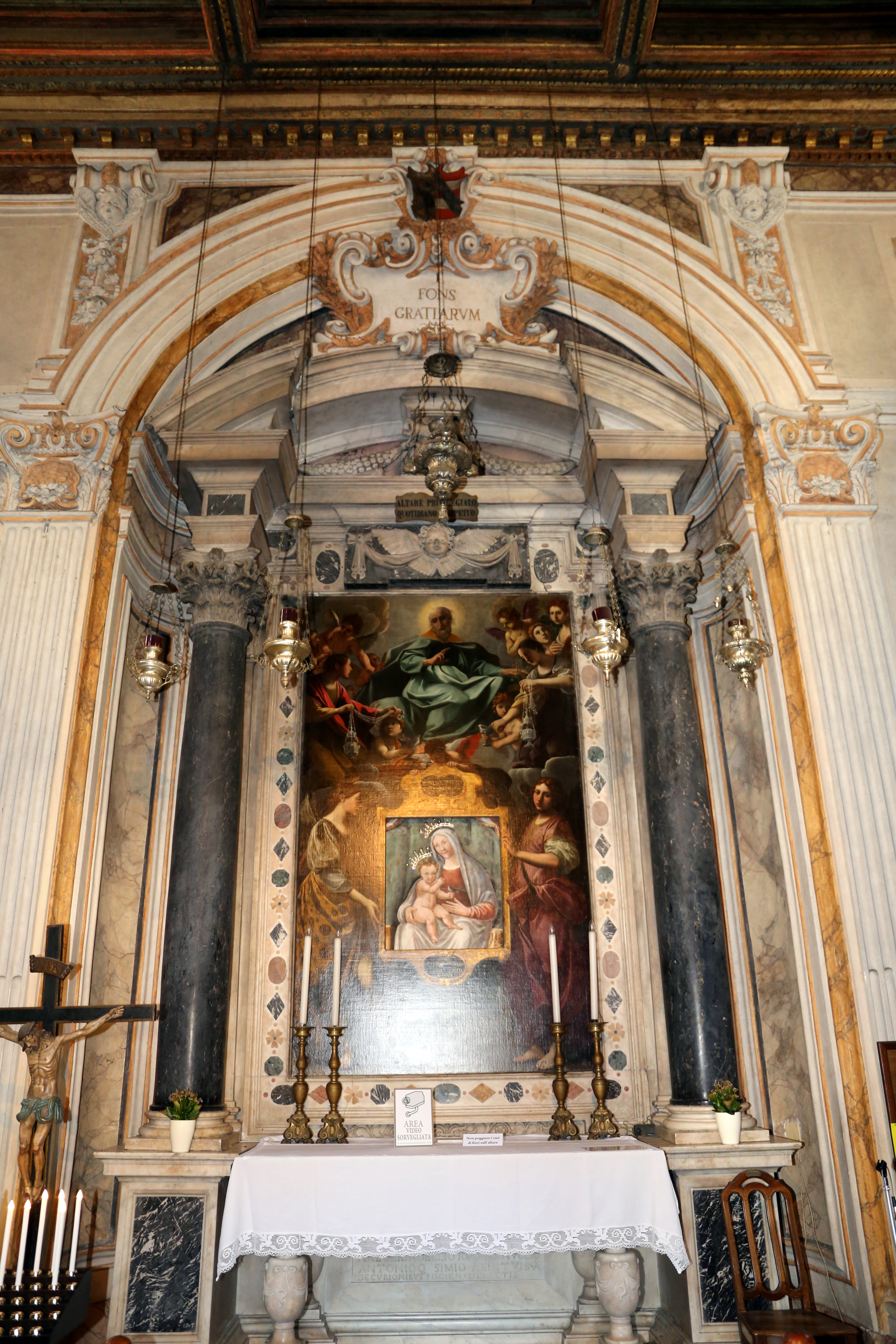 piazza Giuseppe Mazzini This is a photo of a monument which is part of cultural heritage of Italy.